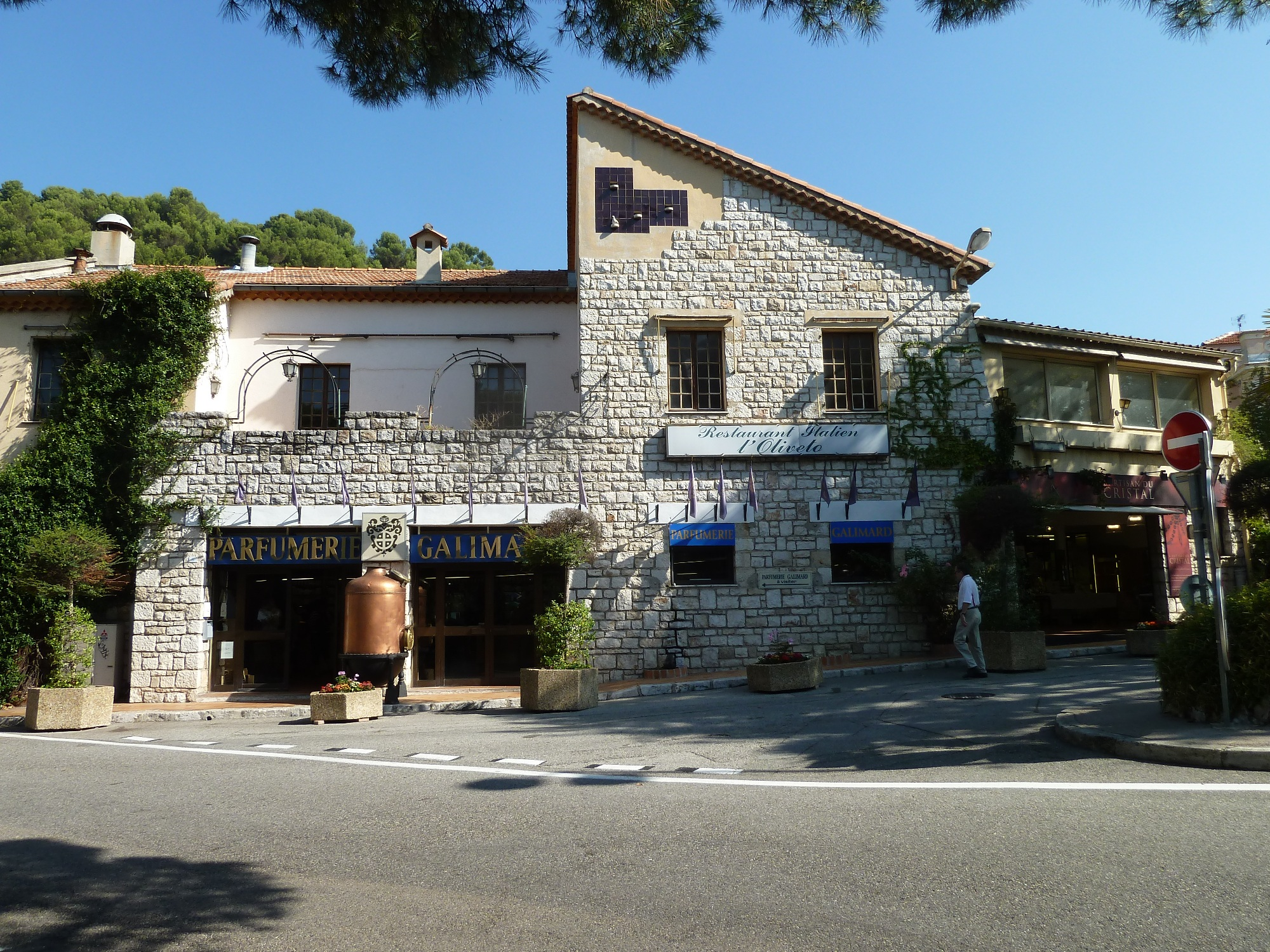 Eze village